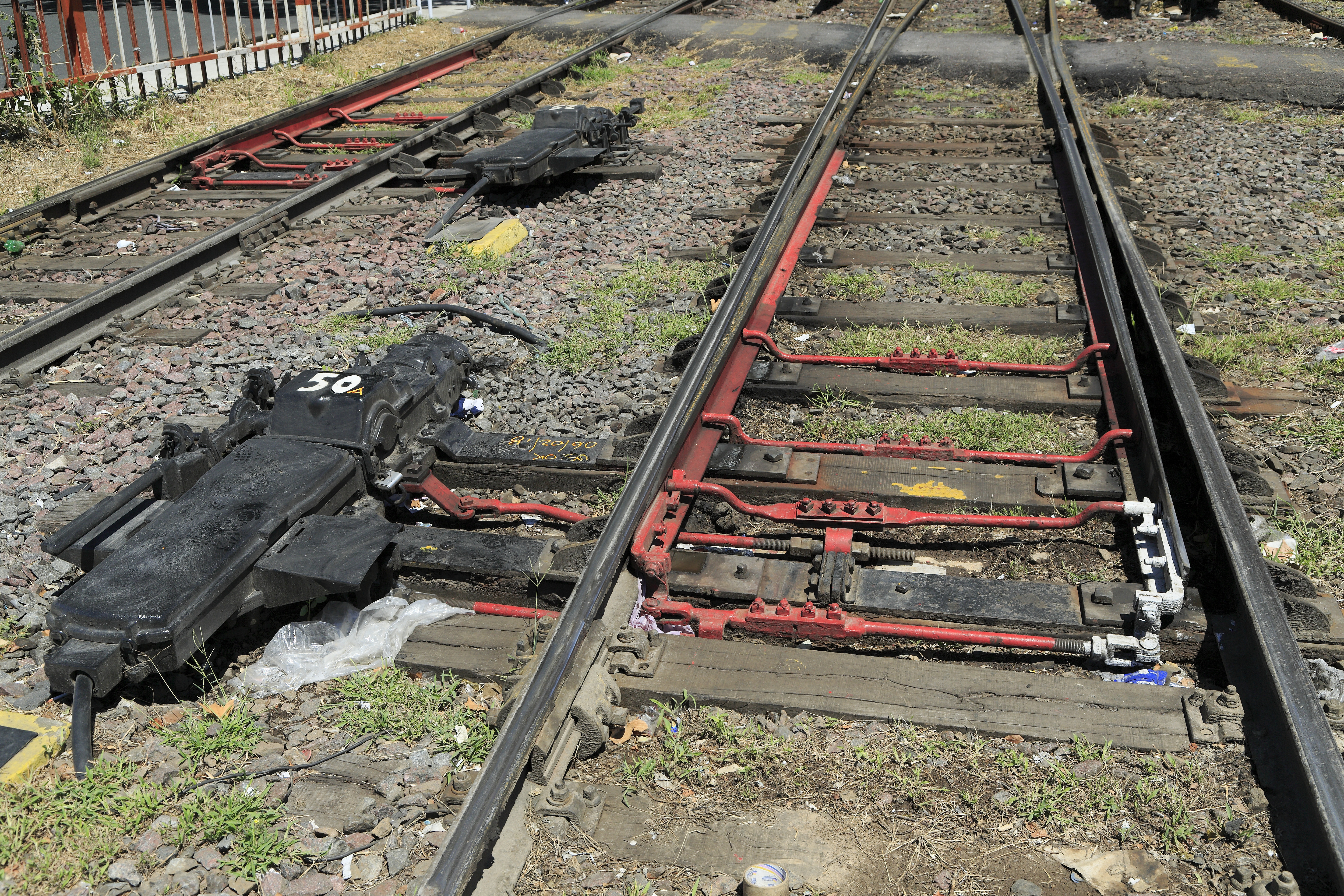 Bahnhof (Buenos Aires) Federico Lacroze, typisch britische Konstruktion mit nur je einer Stellstange und einstellbarem Stellweg. Die Zungendrehpunkte sind auch hier wieder einfache Laschenstöße.